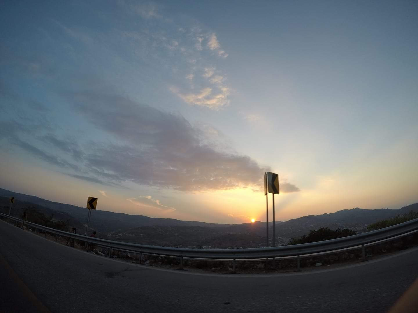 Vista de un atardecer en la carretera internacional